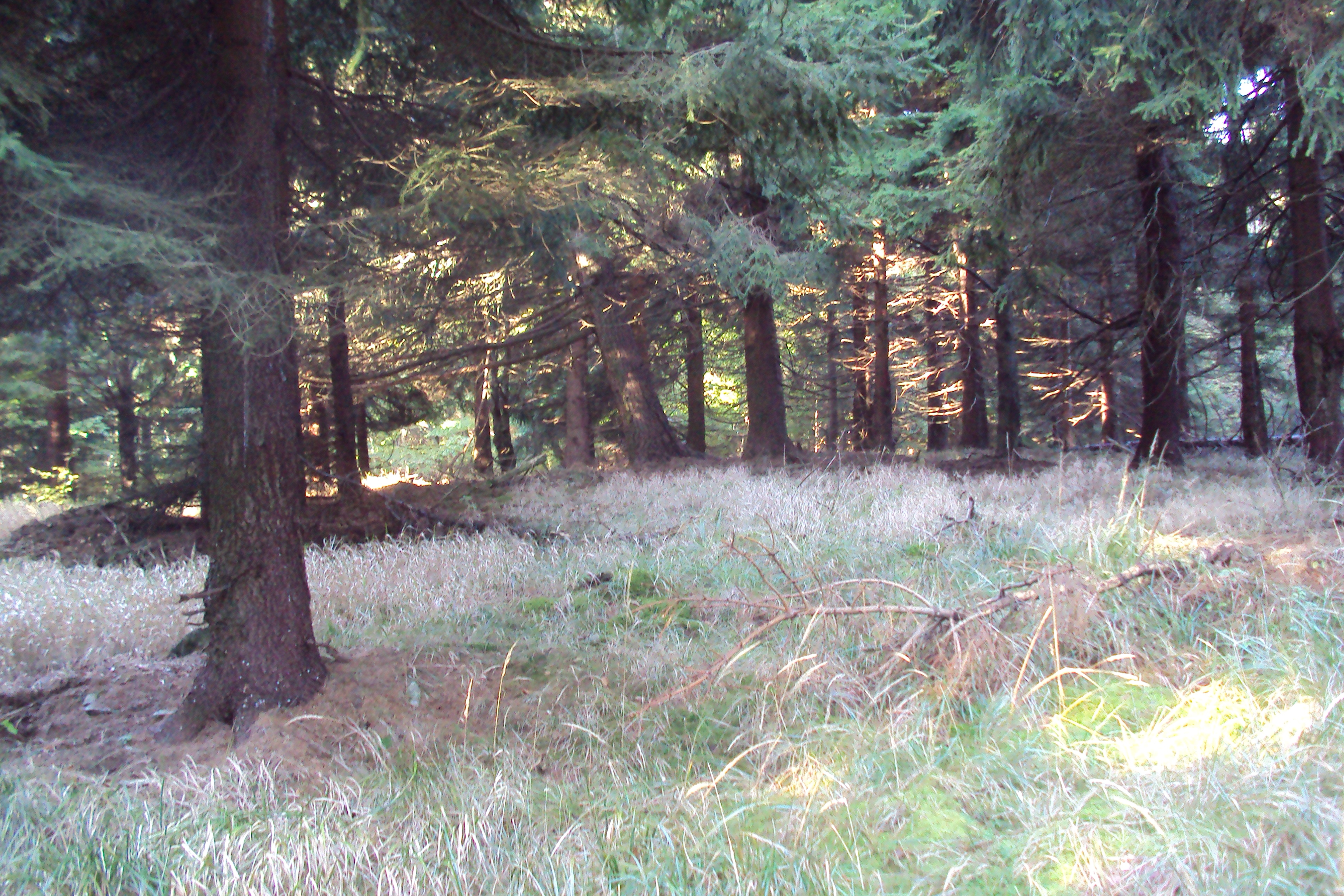 Zalesněný vrcholek Rousínovského vrchu 660 m, nad obcí Rousínov u Svoru